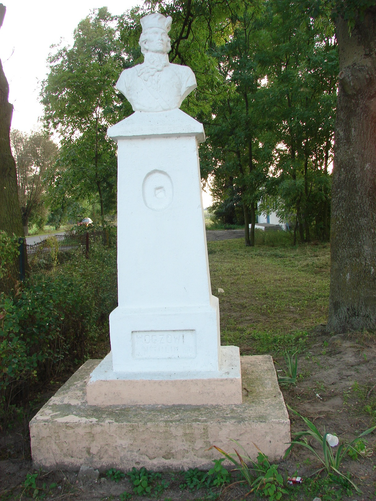 Pomnik Tadeusza Kościuszki w Witulinie (z 1931r.)